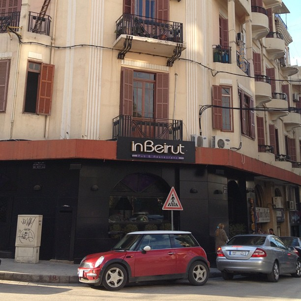 in beirut #nofilter #lebanon